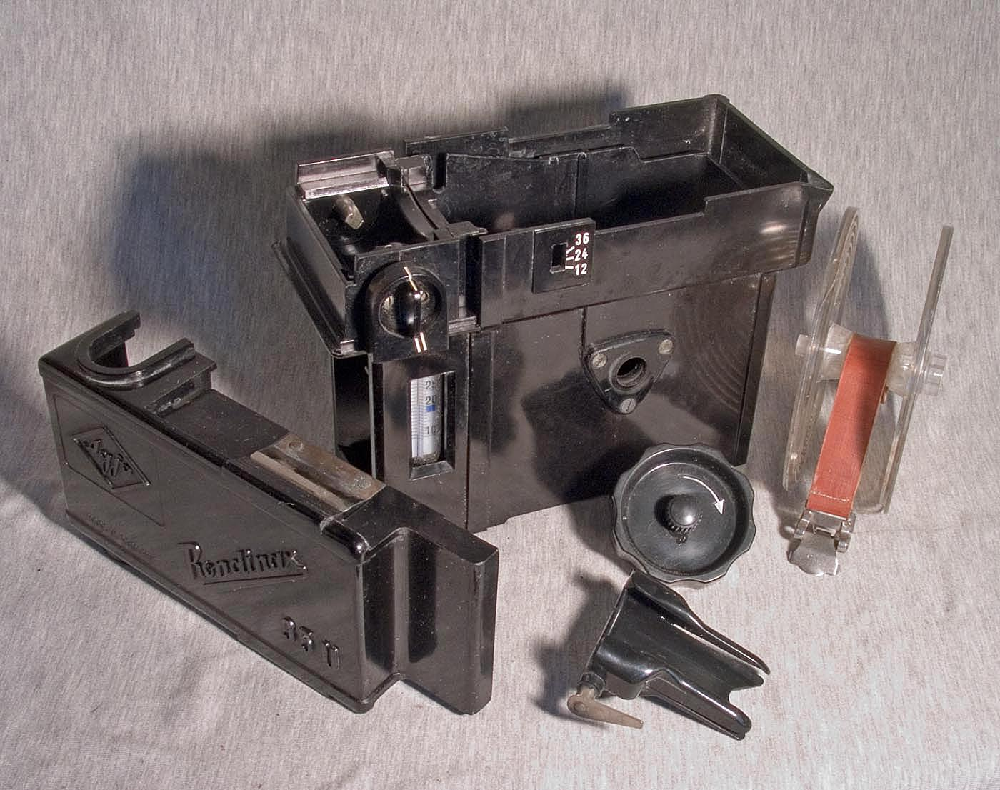 Agfa Tageslichtentwicklungsdose Rondinax35U für 35mm Film